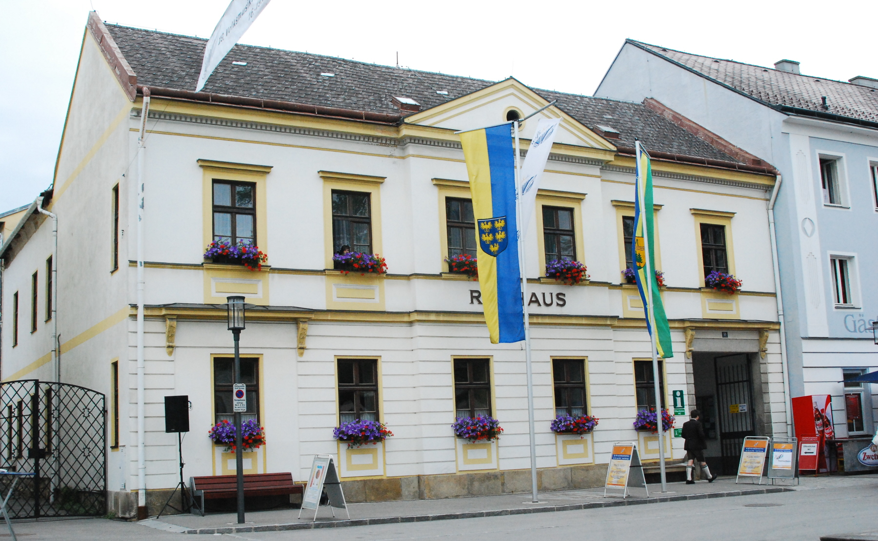 Rathaus von Groß Gerungs in Niederösterreich